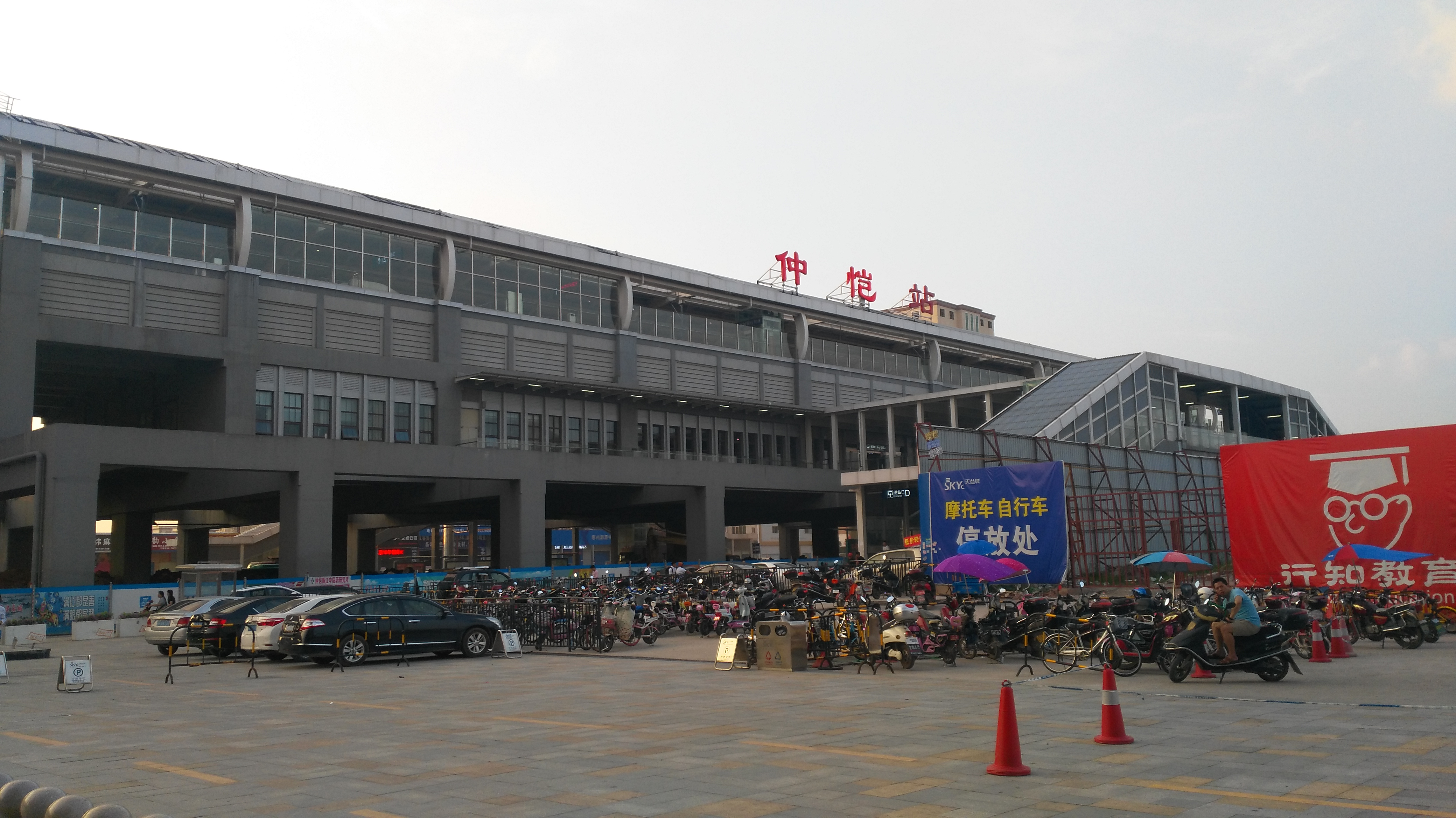 仲恺站 近景